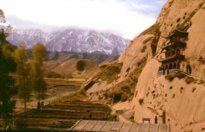 Blick auf die Gebirgszüge des Nan Shan/ Qilian Shan (hier bei den buddhistischen Grotten von Mati Si im Kreis Subei, Gansu) Foto: Andreas Gruschke (Freiburg)